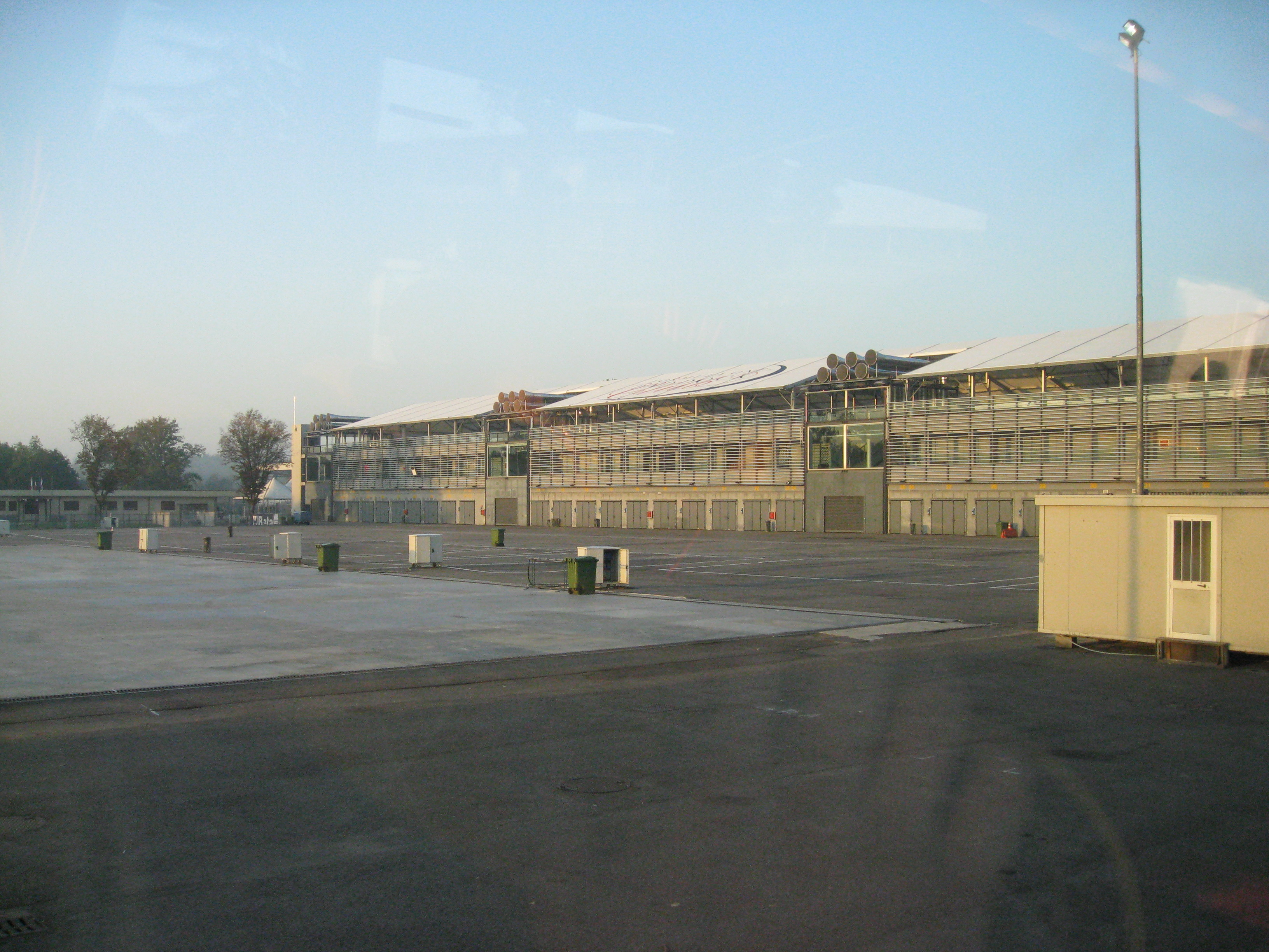 Circuito de Monza, aparcamientoCircuito de Monza